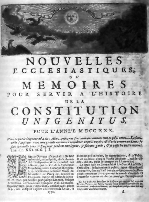 Exemplaire des Nouvelles Ecclésiastiques, quotidien janséniste clandestin